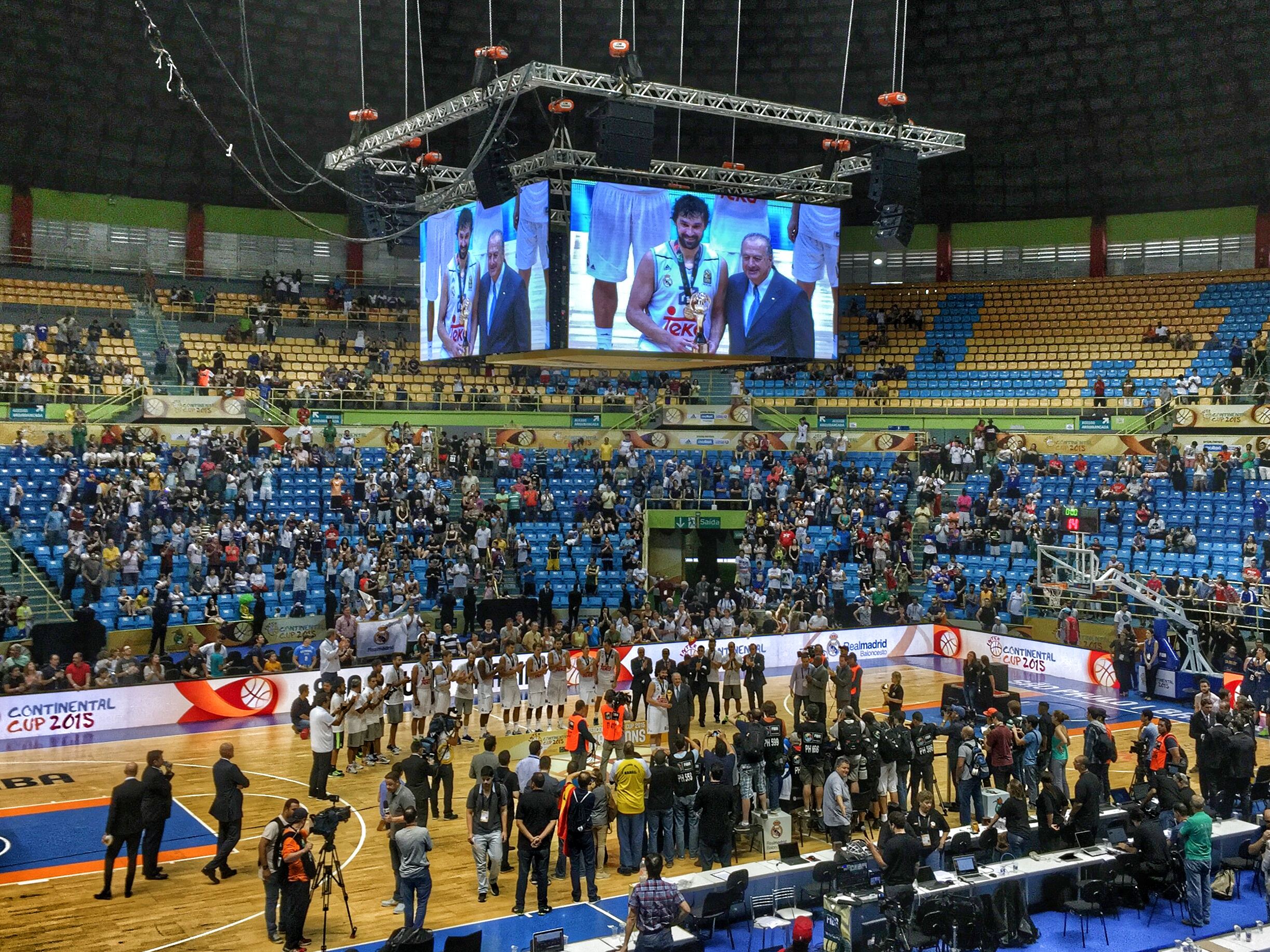 Entrega del premio a MVP a Segio LLull de la final de la Copa Intercontinental 2015 celebrada en Sao Paulo, Brasil